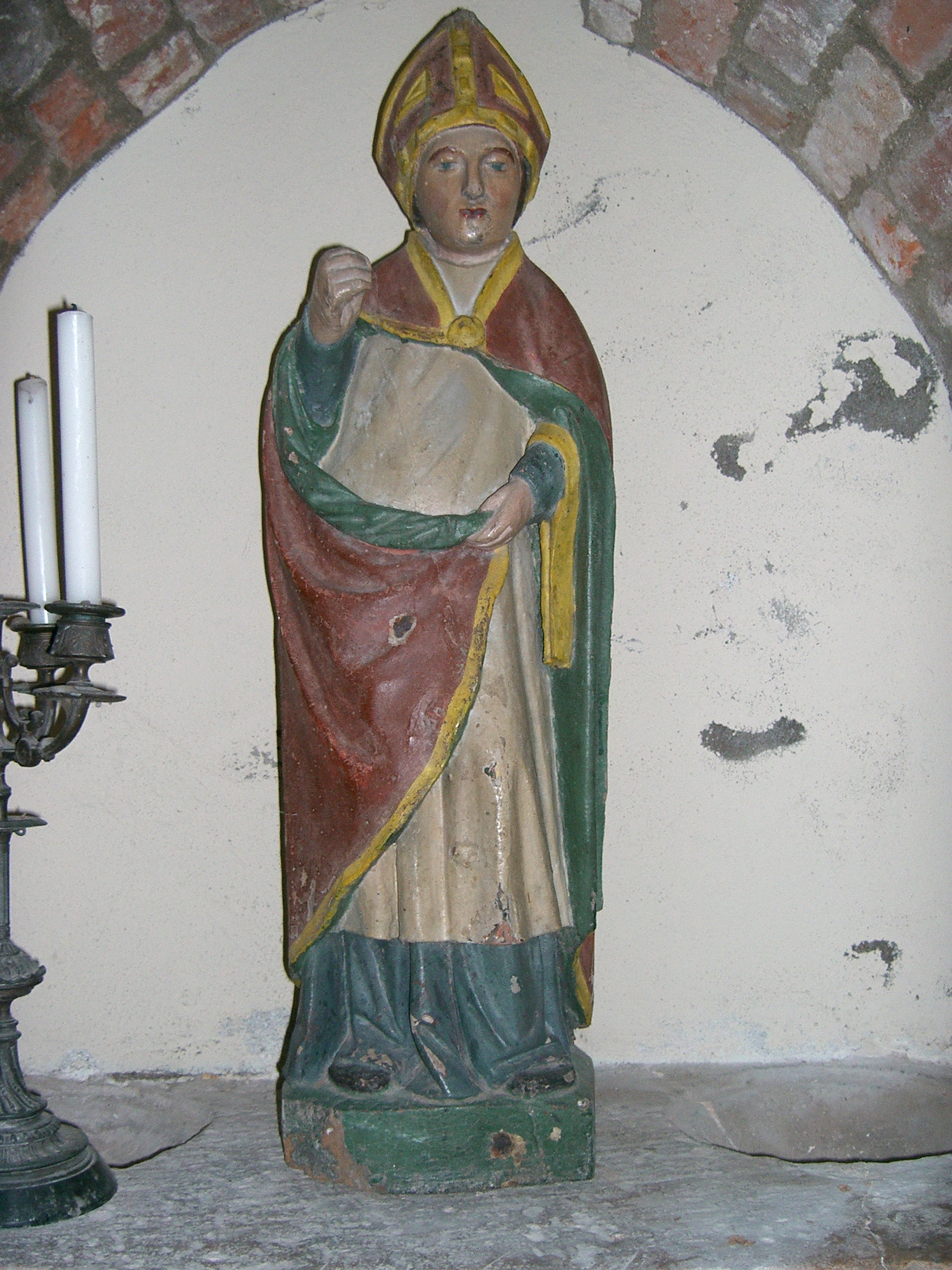 statuette de Saint Léger (XVI e siècle ?) - église de Chivres (Côte d'Or – France)